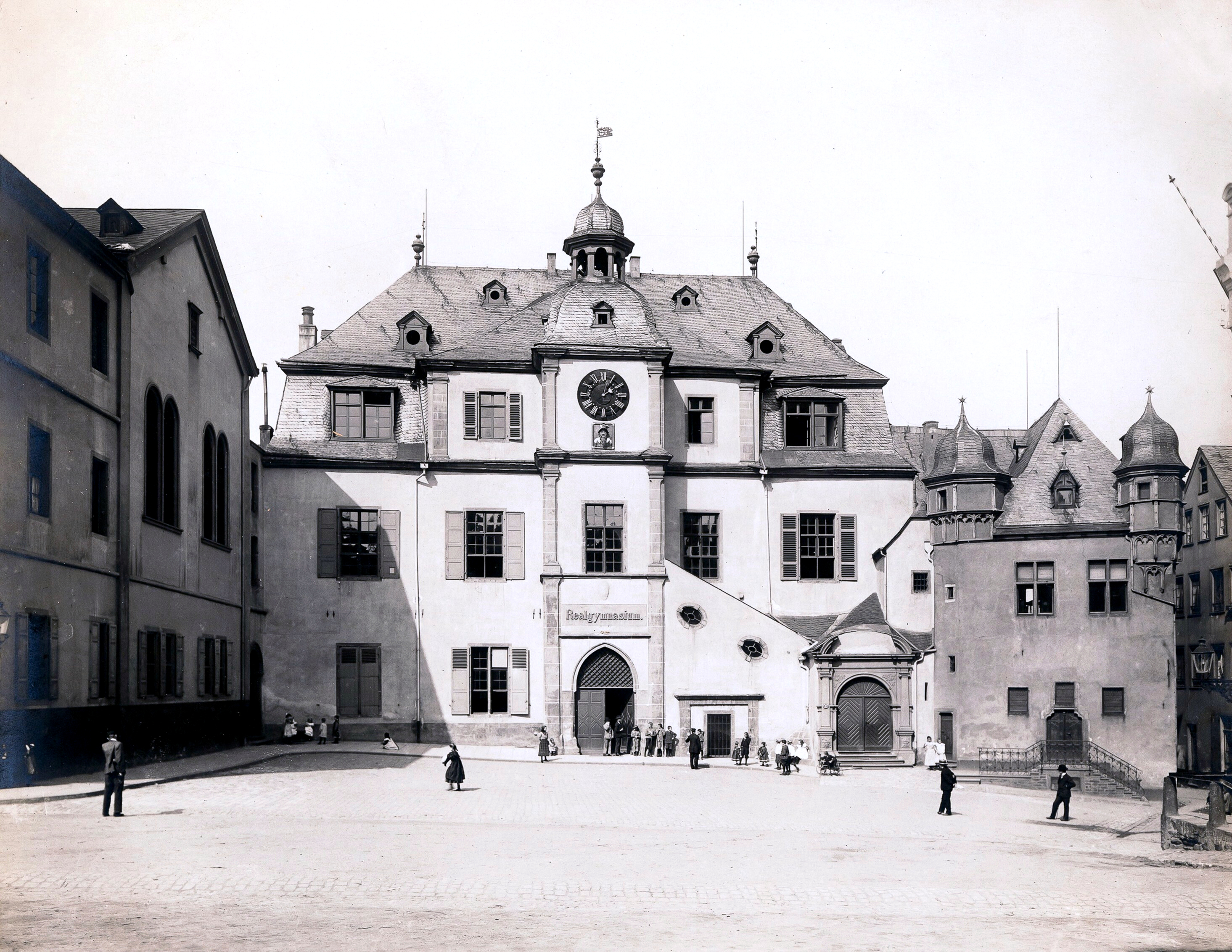 Koblenz, Altes Kaufhaus und Schöffenhaus, links der Bürresheimer Hof (Synagoge)